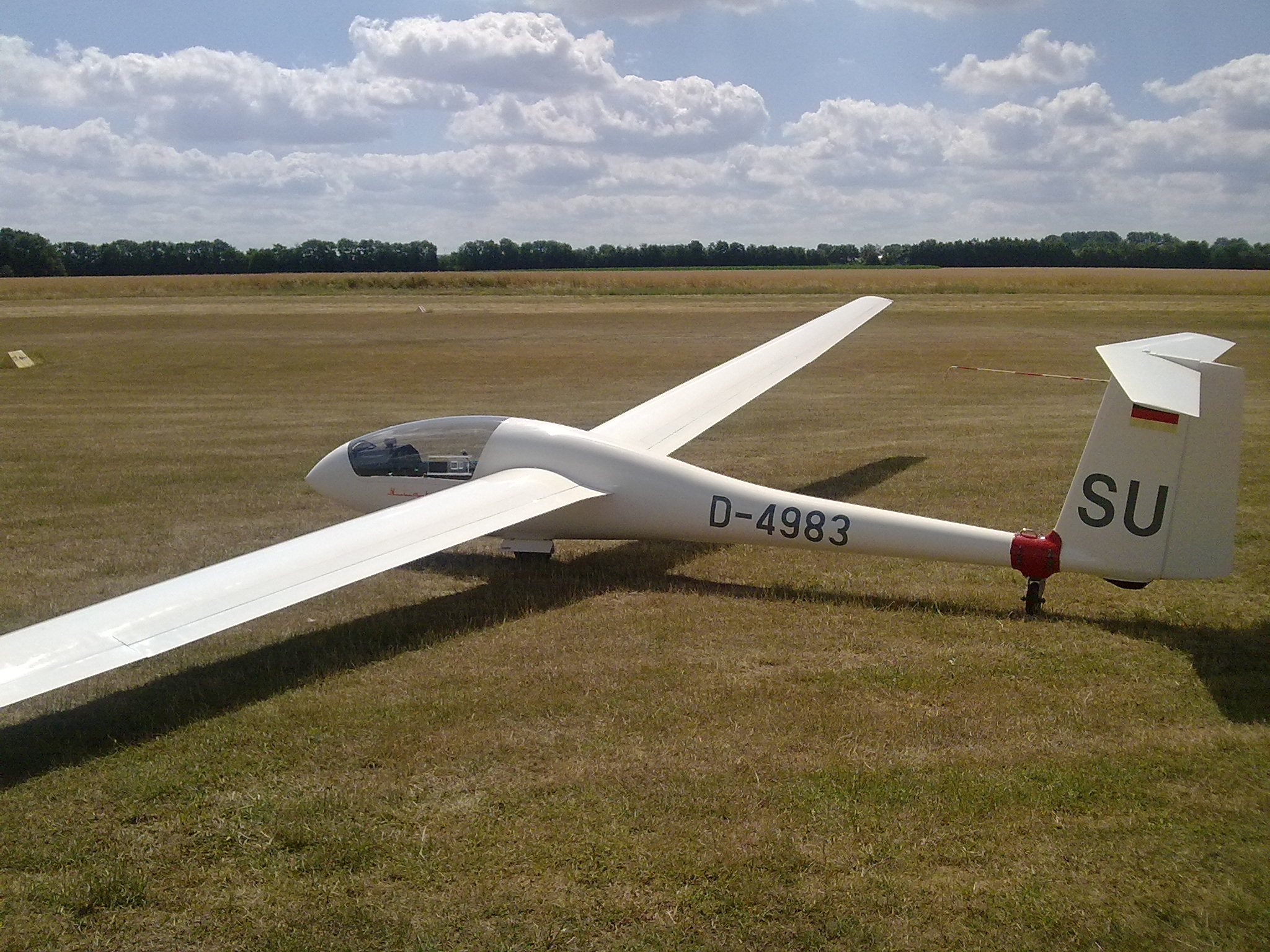 Leitwerk